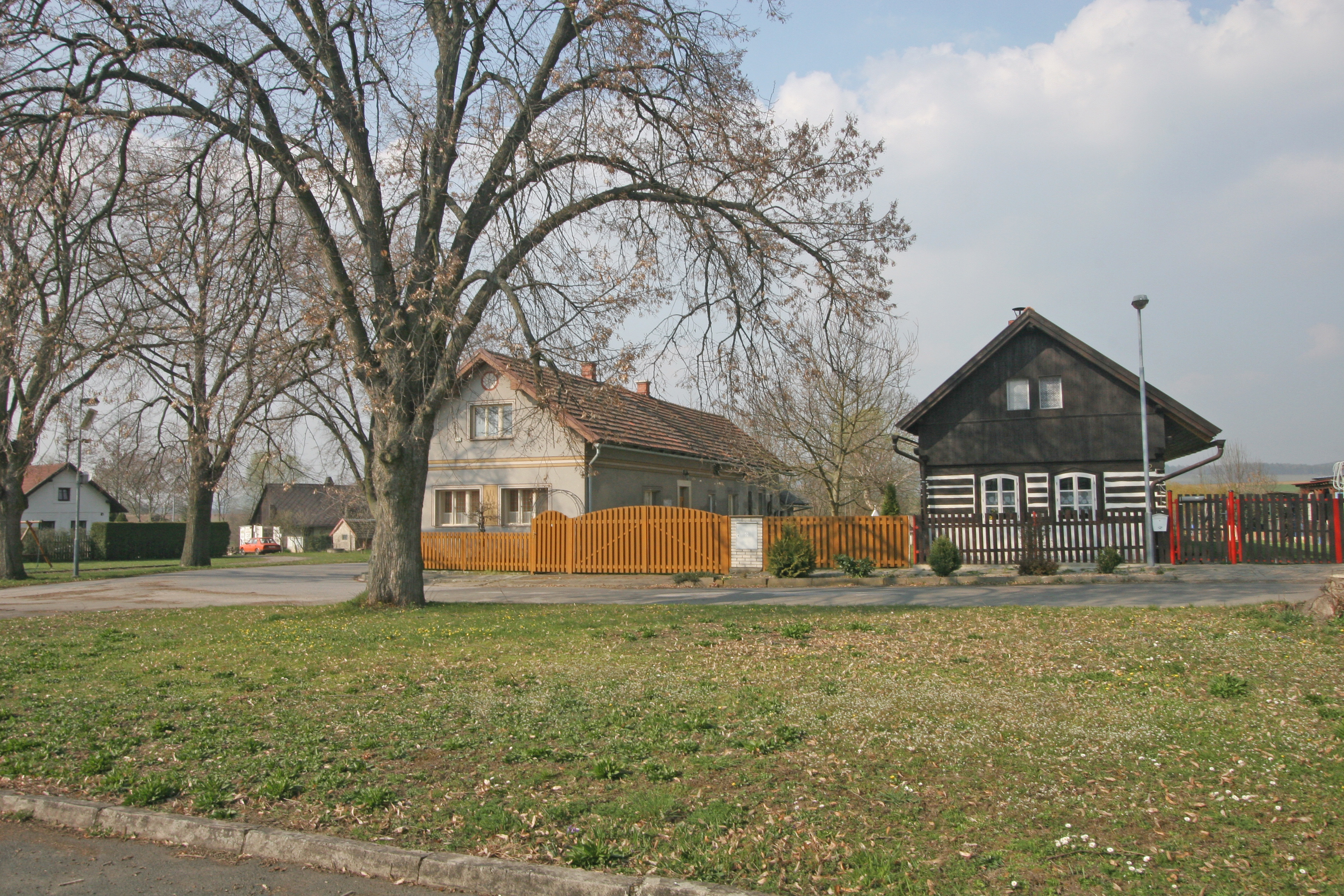 Nové Smrkovice čp. 1 a 2